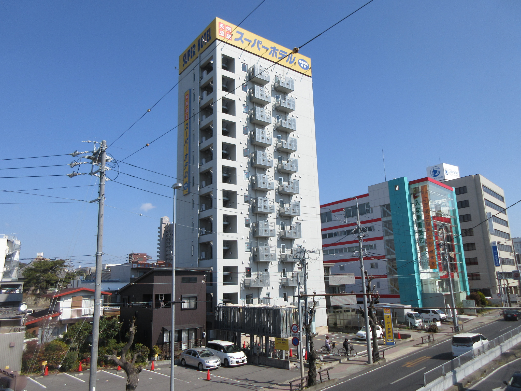 スーパーホテル岡崎（岡崎市祐金町）